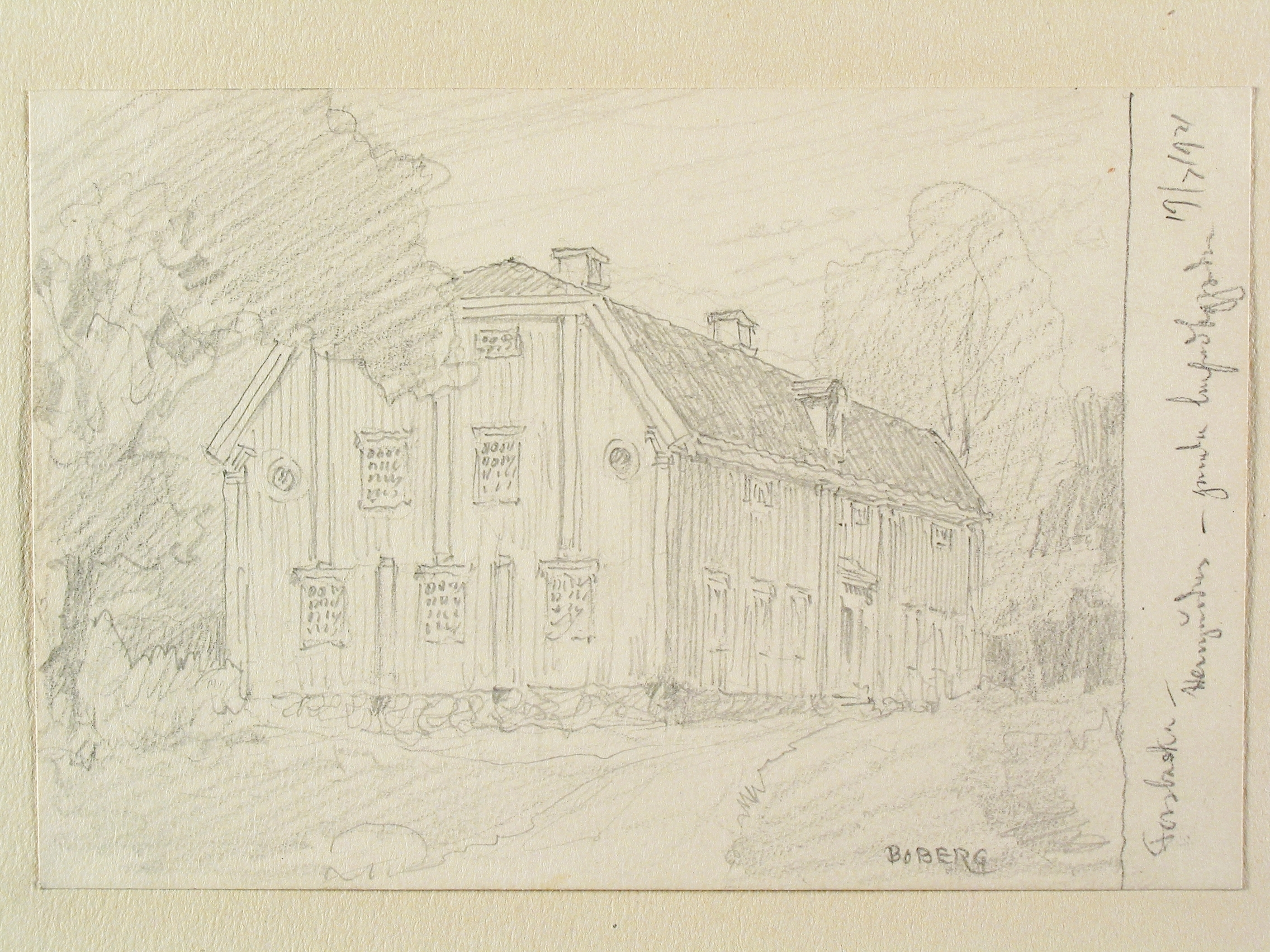 Flygel av Forsbacka herrgård, Dalsland. Teckning av Ferdinand Boberg. Depicted place: Tössbo (Härad), Forsbacka (Ort)